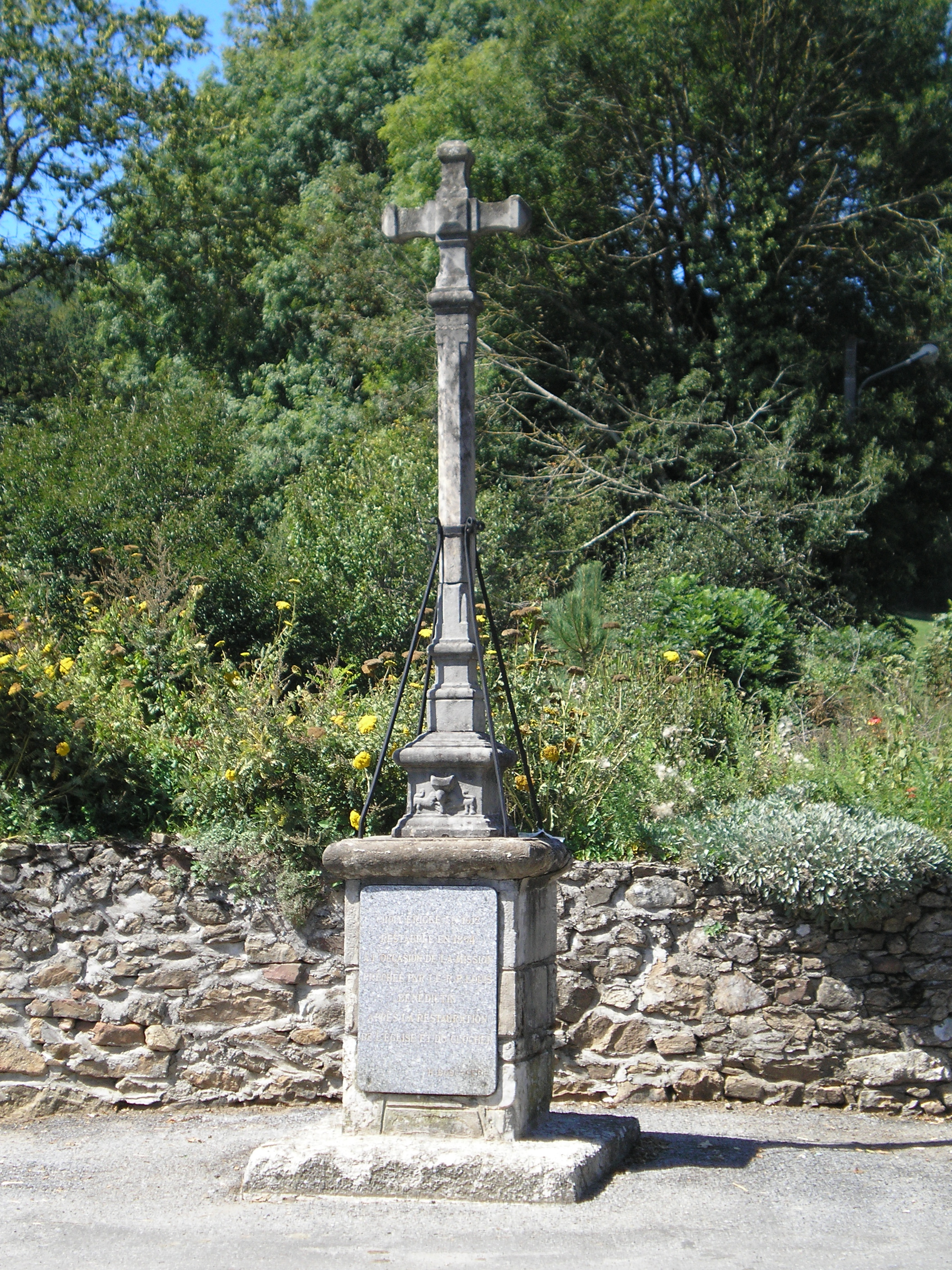 Nages (Tarn) - croix (1617, restaurée en 1894, puis en 1960 et déplacée) marbre de Carrières - hauteur = 2,50 m, largeur = 65 cm, épaisseur = 15 cm. Située initialement au carrefour des chemins de la Salvetat et Pontis.